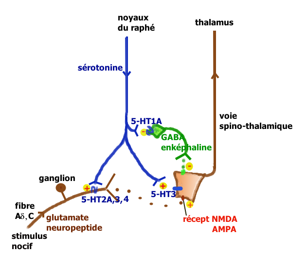 Voie descendante facilitatrice sérotoninergique dans la corne dorsale d'après Millan Progress in neurobio 66 (2002)